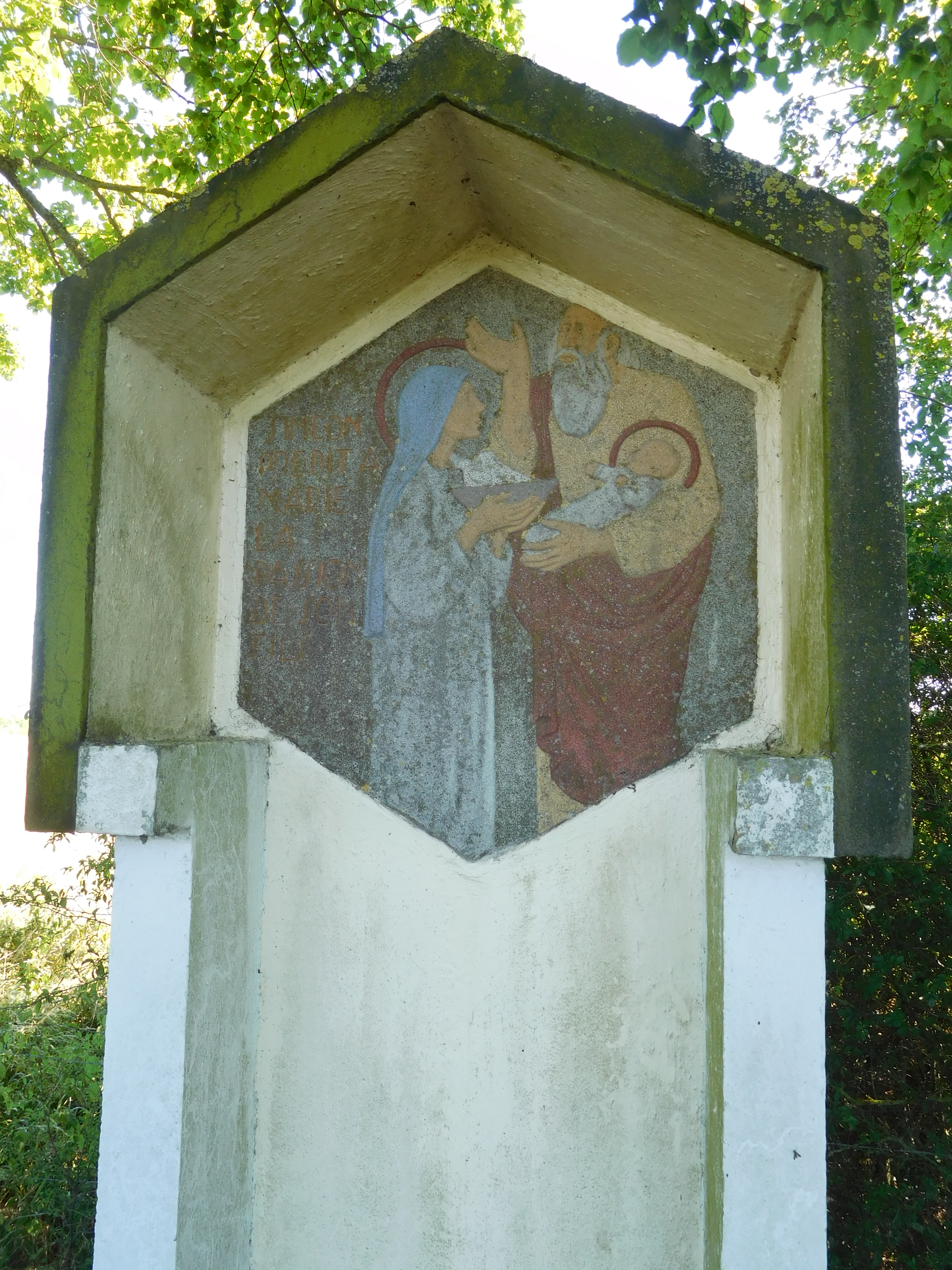 L'artiste Jijé dessina une série de 7 stations (pour les sept douleurs de la Vierge Marie) qui se trouvent sur le chemin conduisant à la chapelle du Haurt, à Bure (Belgique)